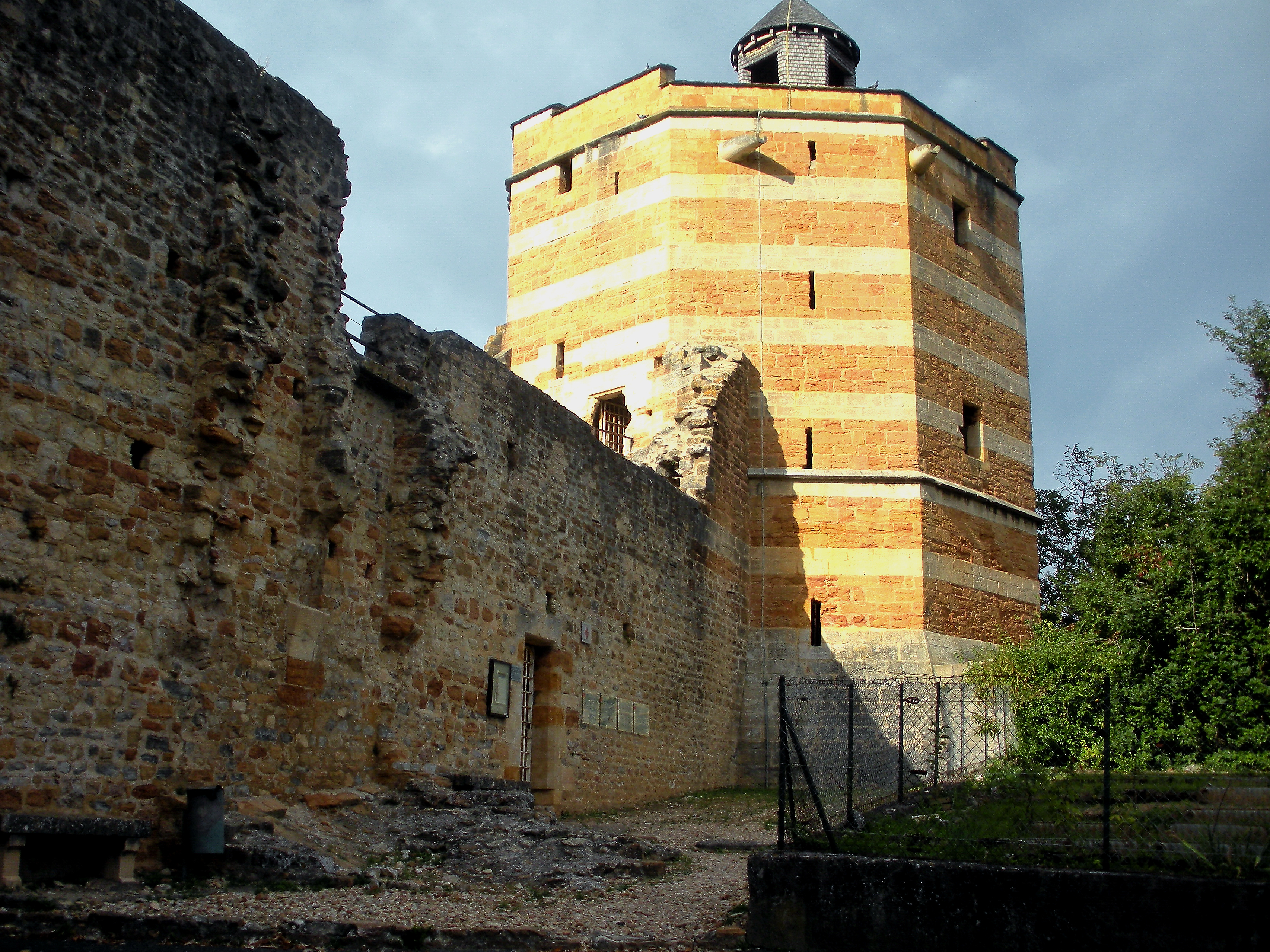 les remparts